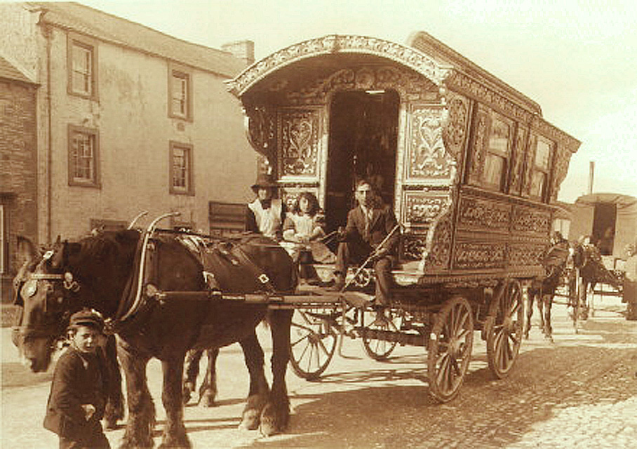 Verdine gitane en Grande-Bretagne